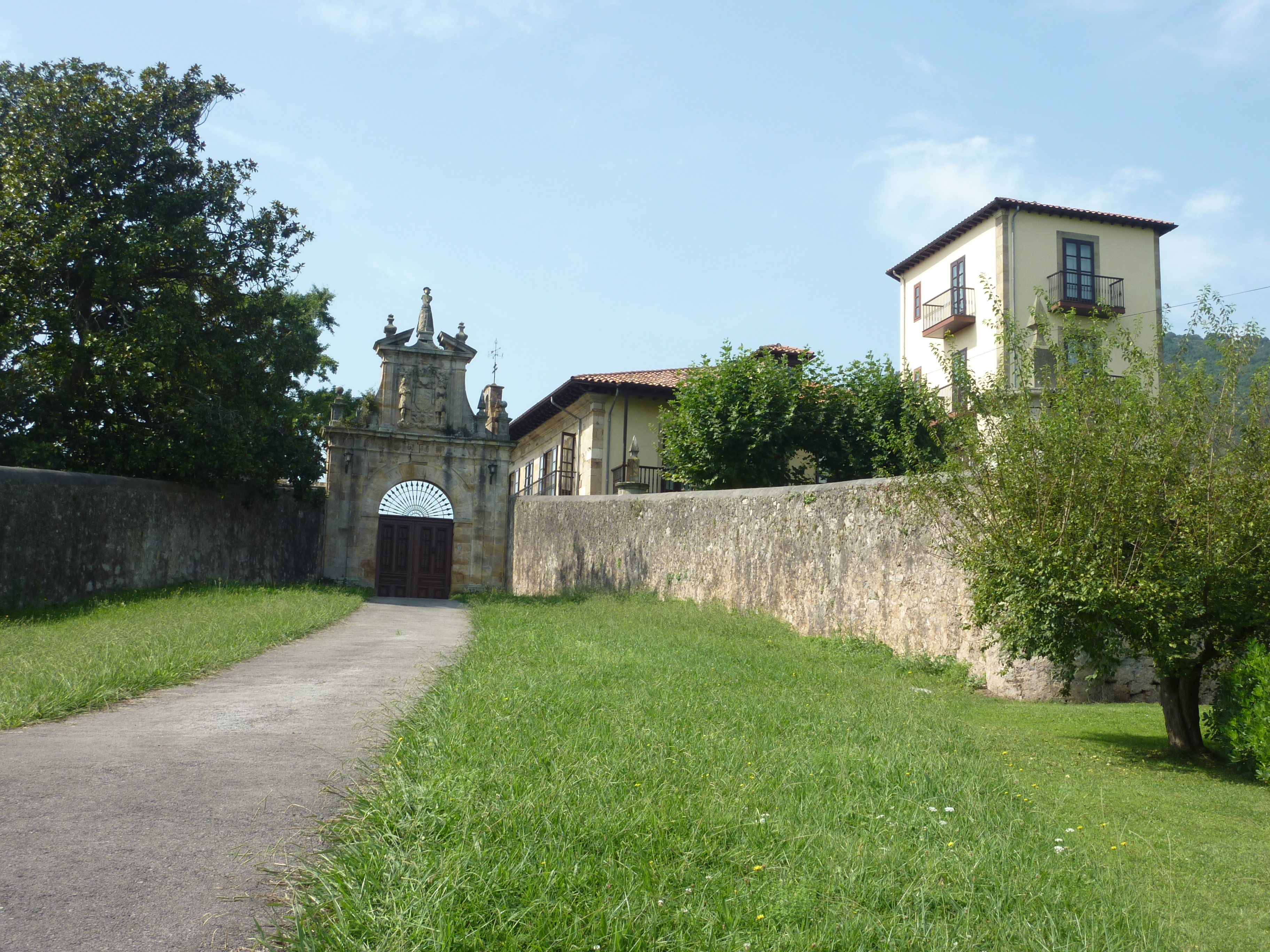 Casa Solariega de los Cuetos Sobremazas. Medio Cudeyo-Cantabria